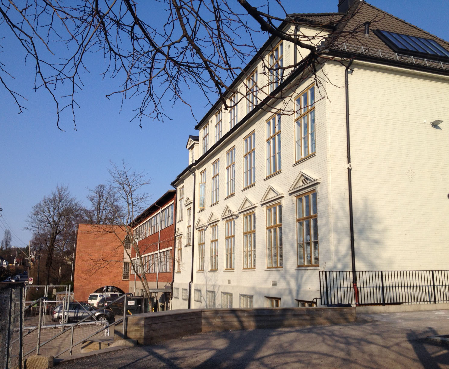 Vinderen skole i Oslo